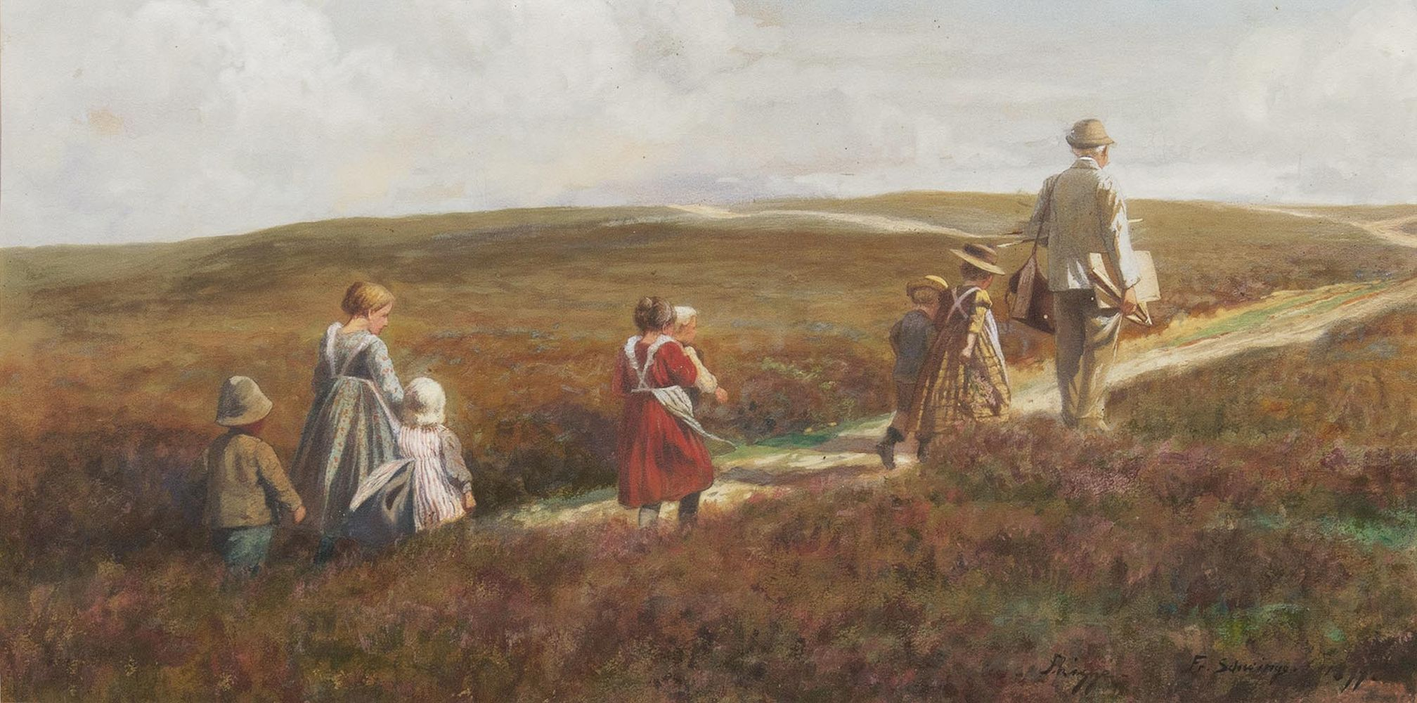 Der Maler und die Kinder, 1Gouache, 57 × 30,5 cm